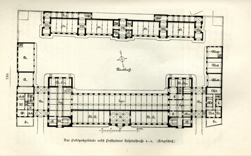 Das kaiserliche Paket- und Zeitungspostamt in Leipzig am Johannisplatz (Prager Straße, damals Hospitalstraße 4-10) im Jahre 1892. Grundriss Erdgeschoss für Haupt- und Nebengebäude. Stich aus Leipzig und seine Bauten, S. 145